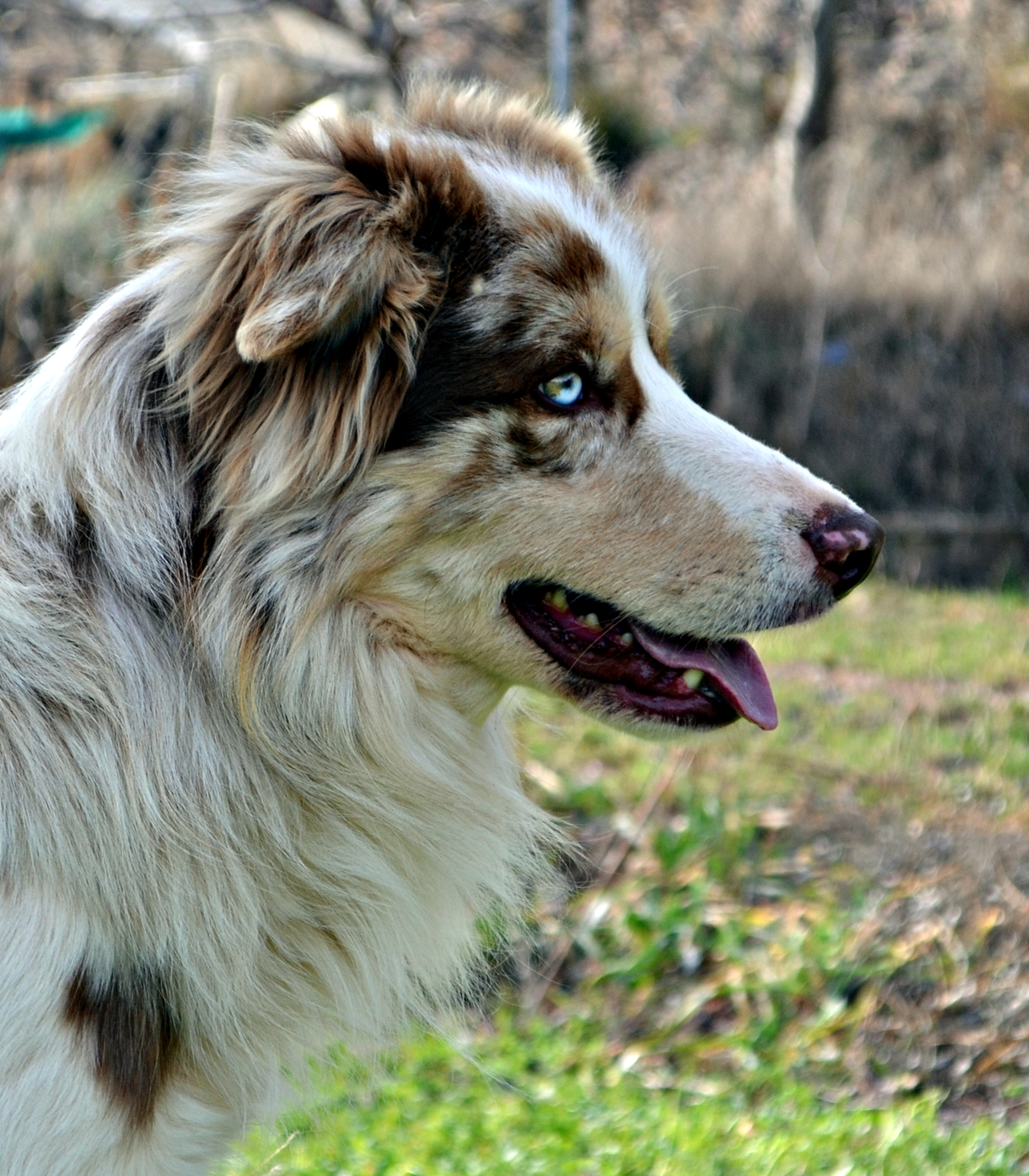 Border Collie Macho Rojo Mirlo